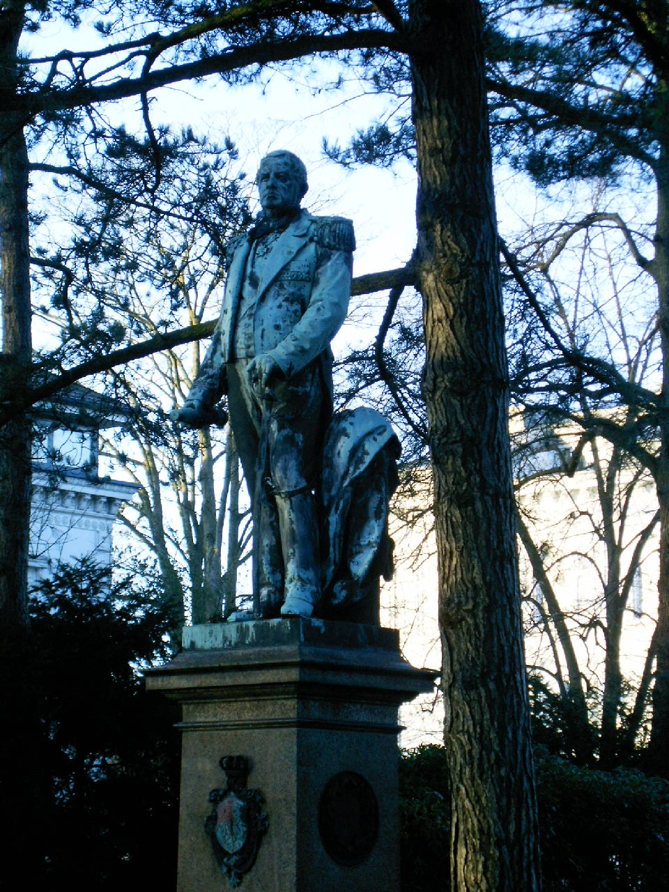 Denkmal des Prinzen Adalbert in Wilhelmshaven, eigene Aufnahme, Dezember 2004, gemeinfrei